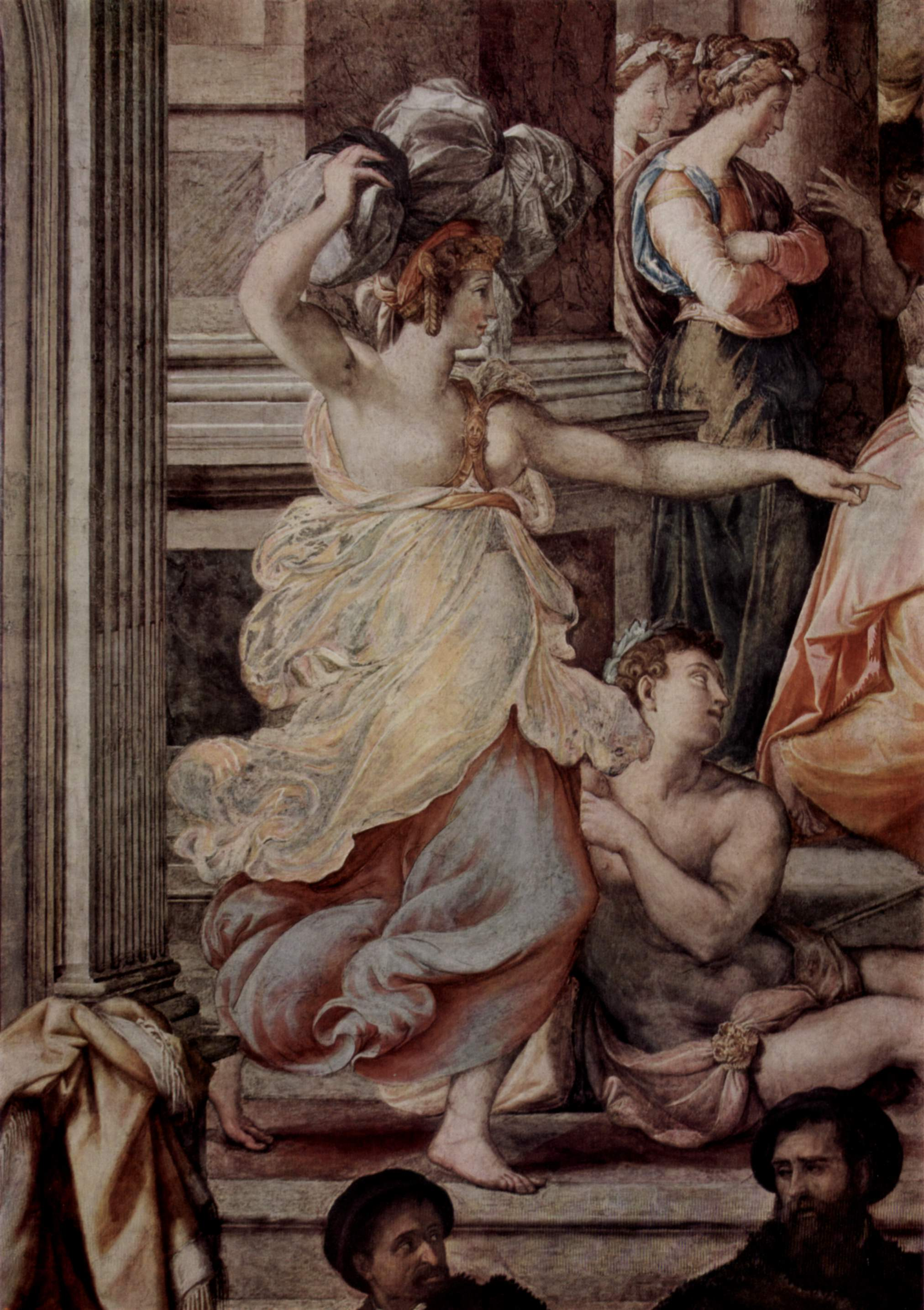 detail